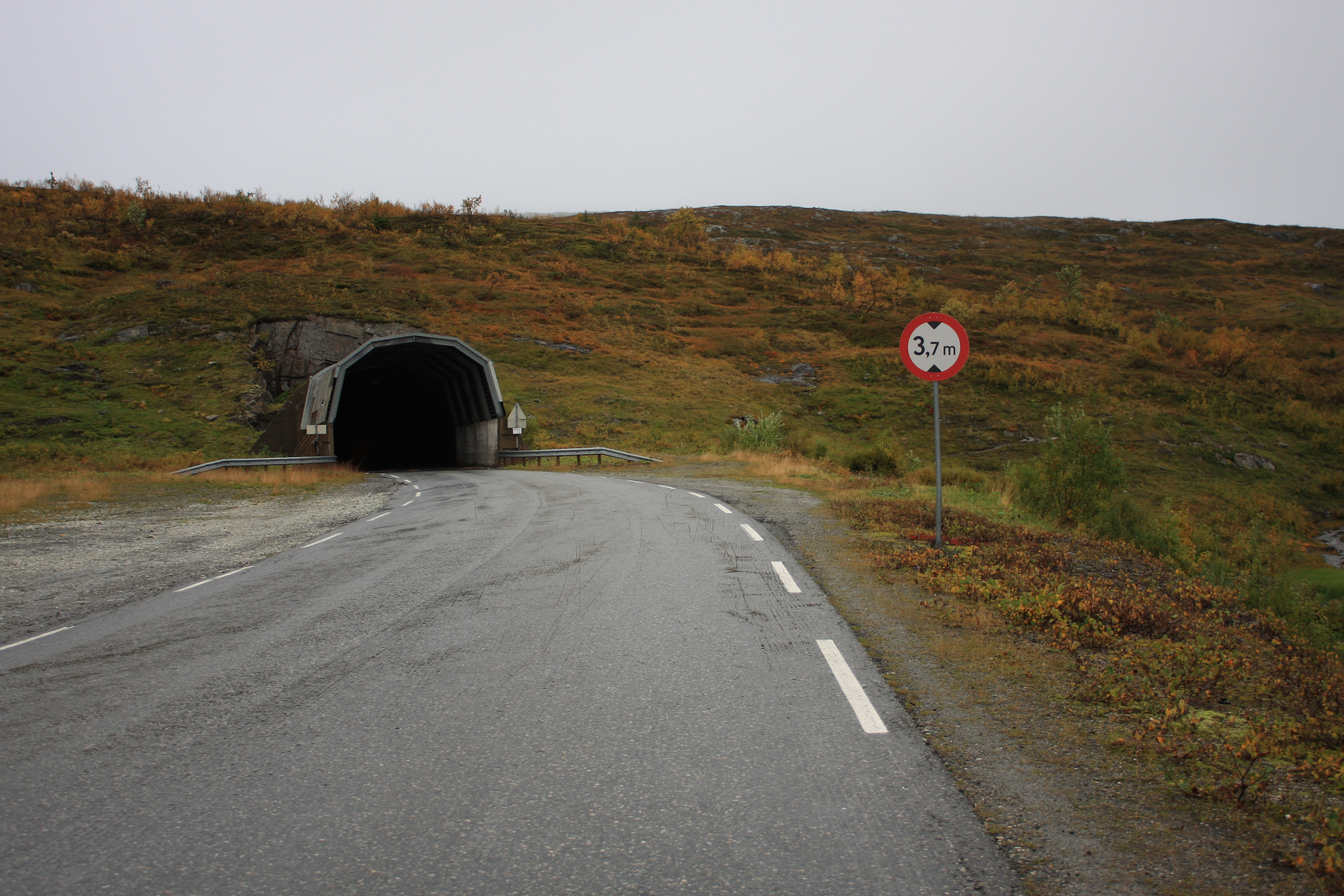 Norsk (bokmål): Steinfjelltunnelen